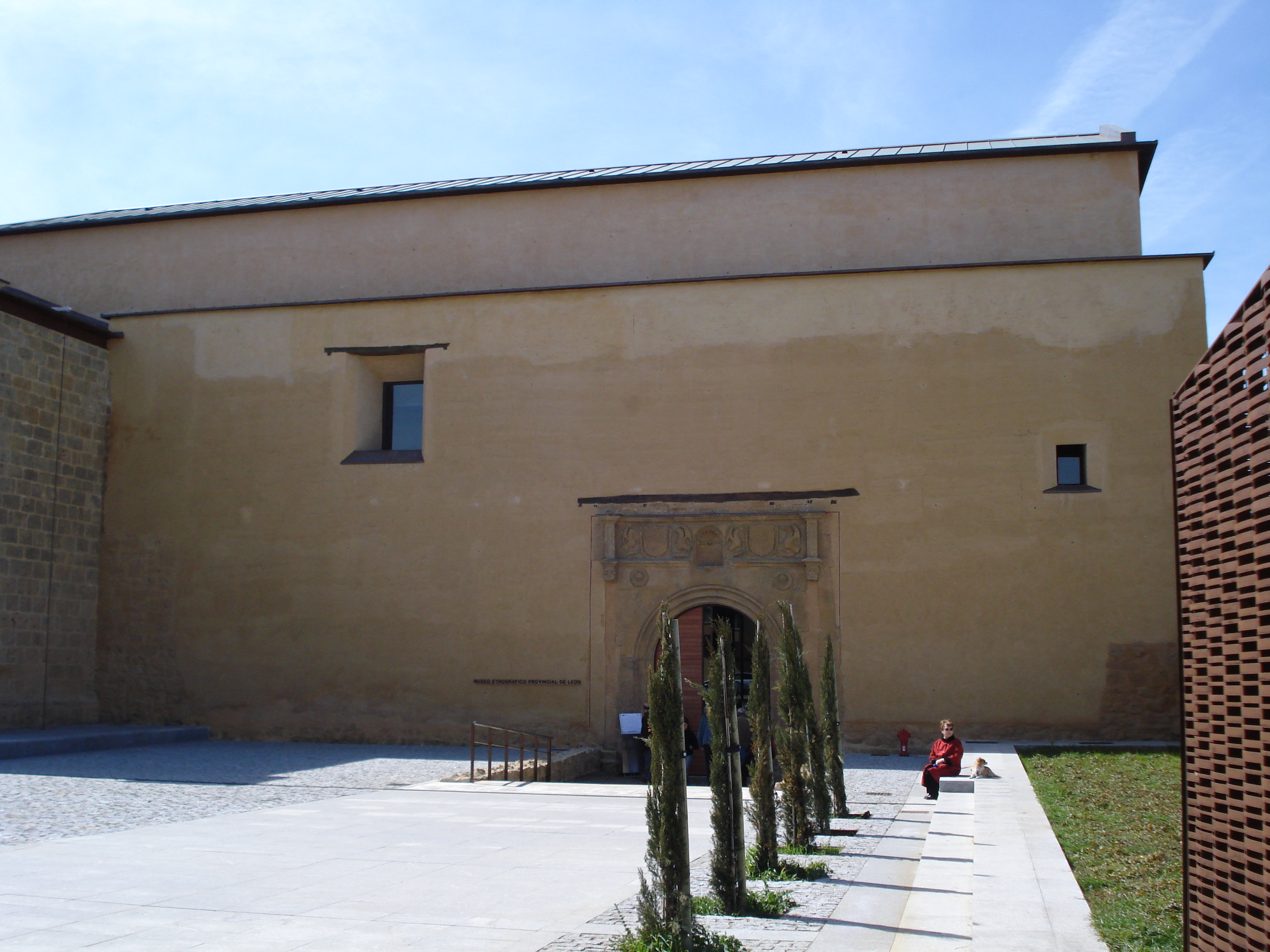 Plaza de entrada al Museo Etnográfico de León.